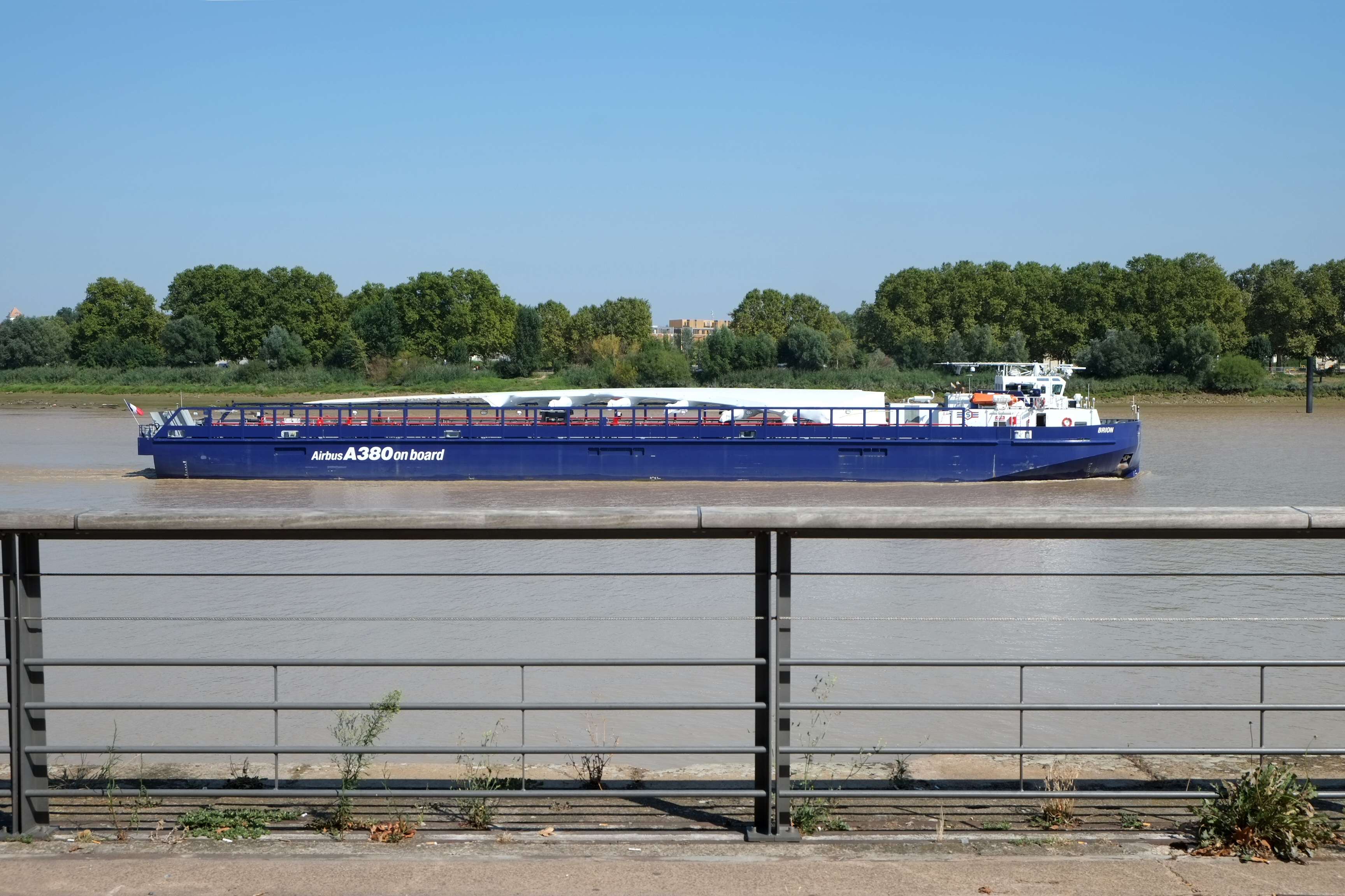 Transport d'une aile d'Airbus A380 sur le fleuve à Bordeaux